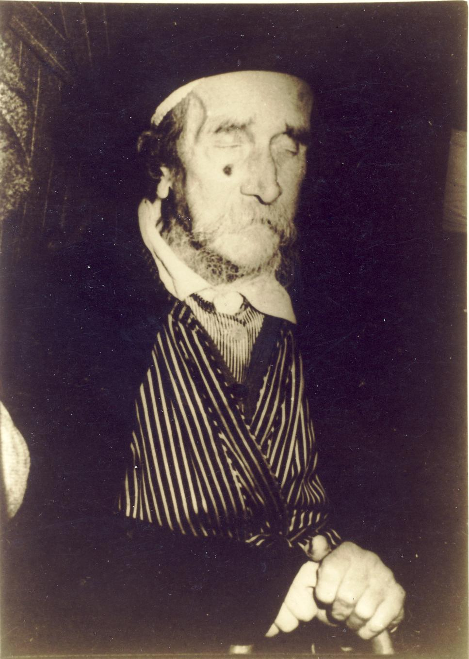 רבי מרדכי חיים קסטלניץ מסלונים (סלאנים) בעל "מאמר - מרדכי" המכונה רבי מוטל דיין